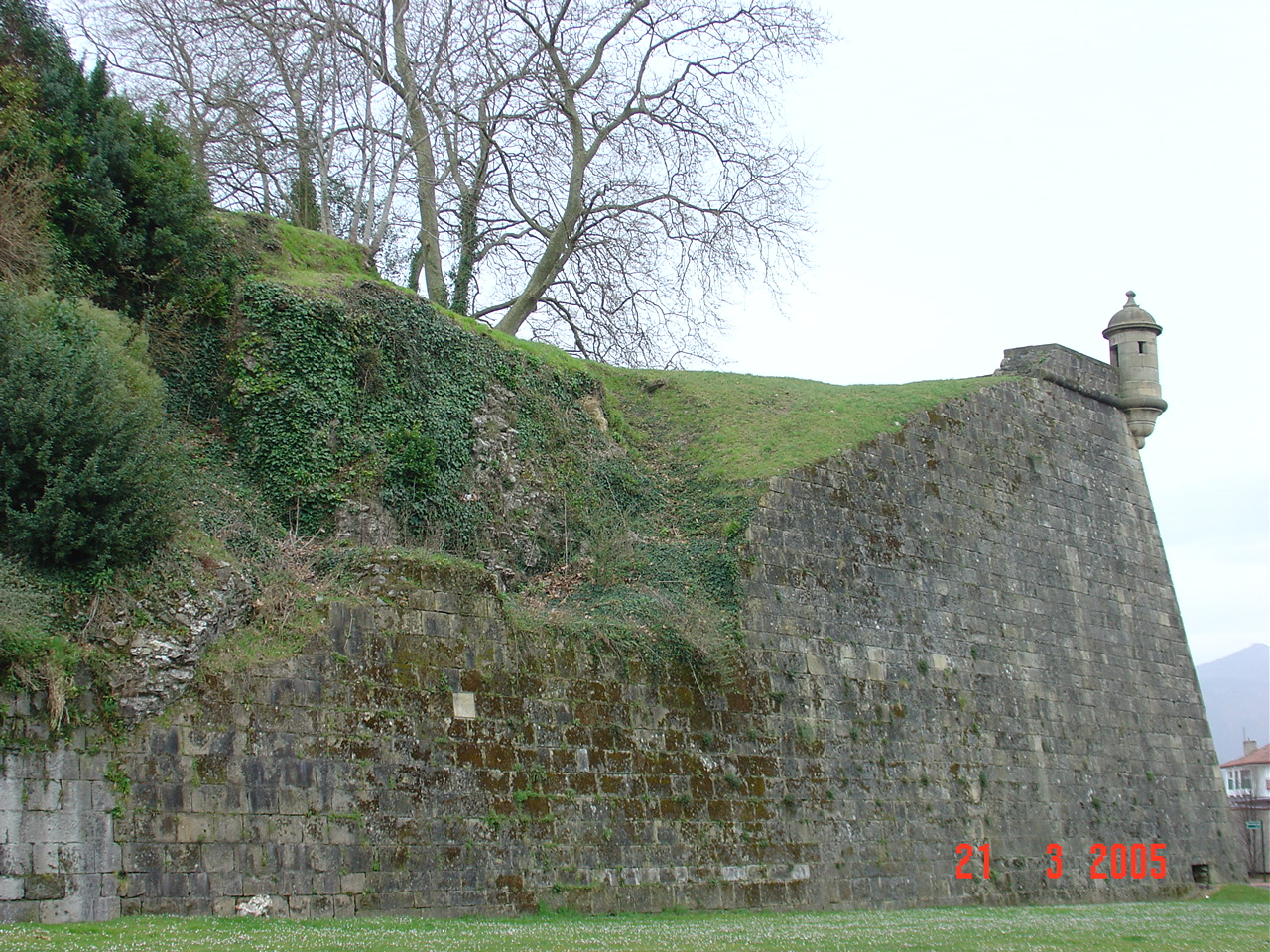 Erreginaren baluartea